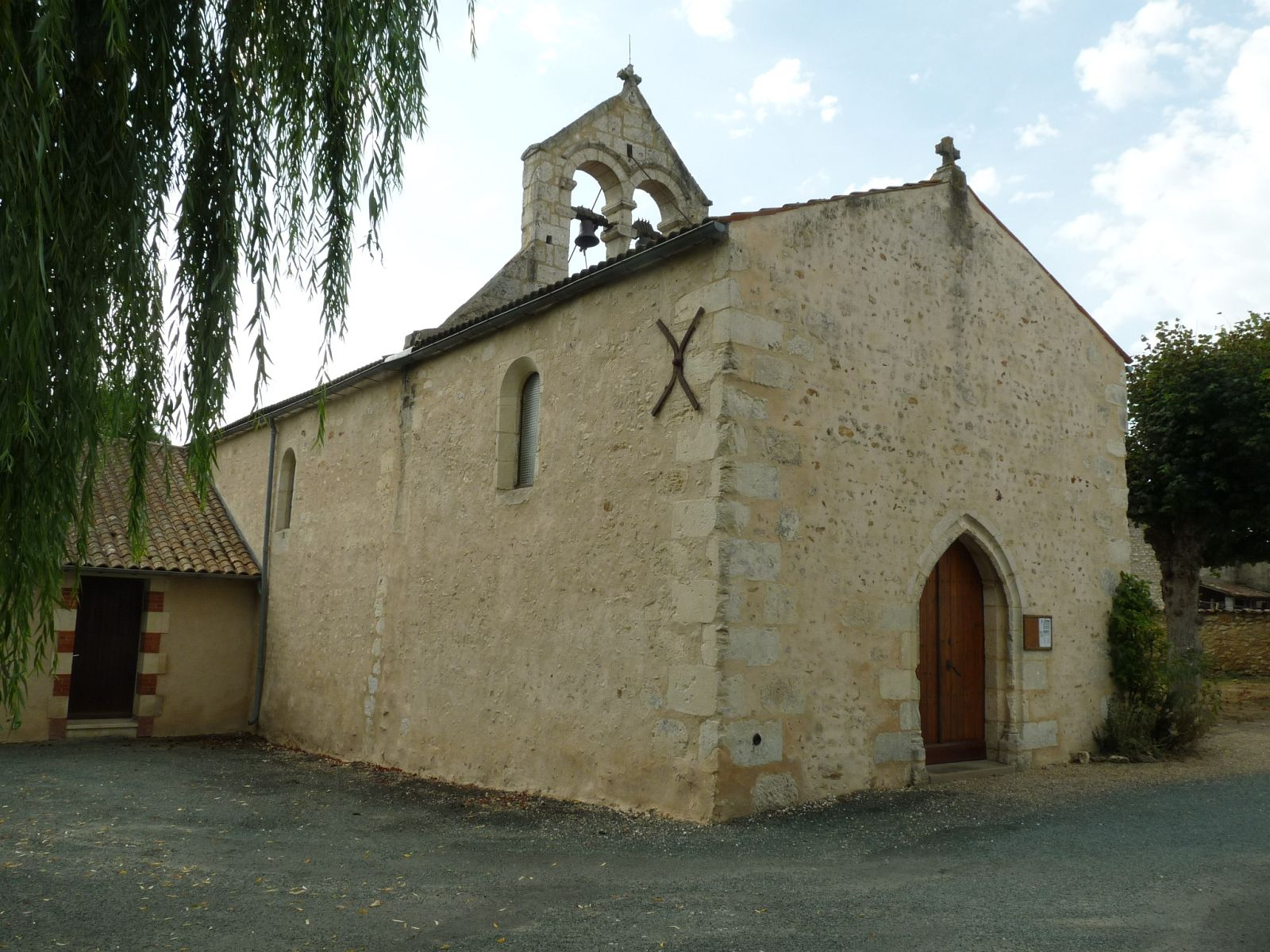 église de Virollet (17), France